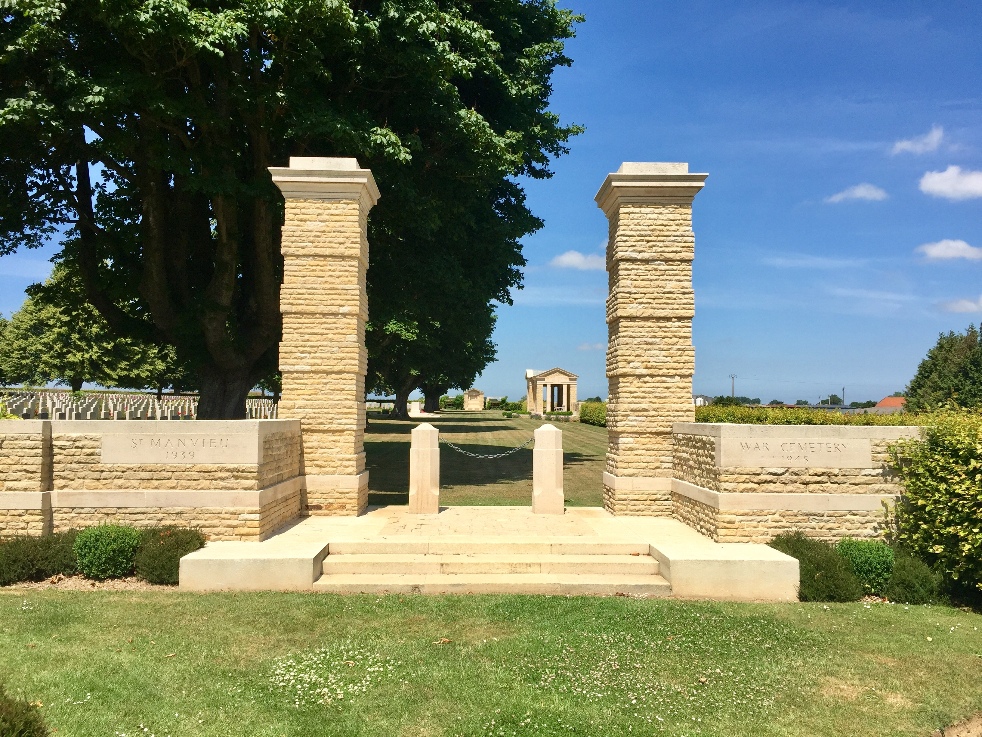 Entrée du cimetière